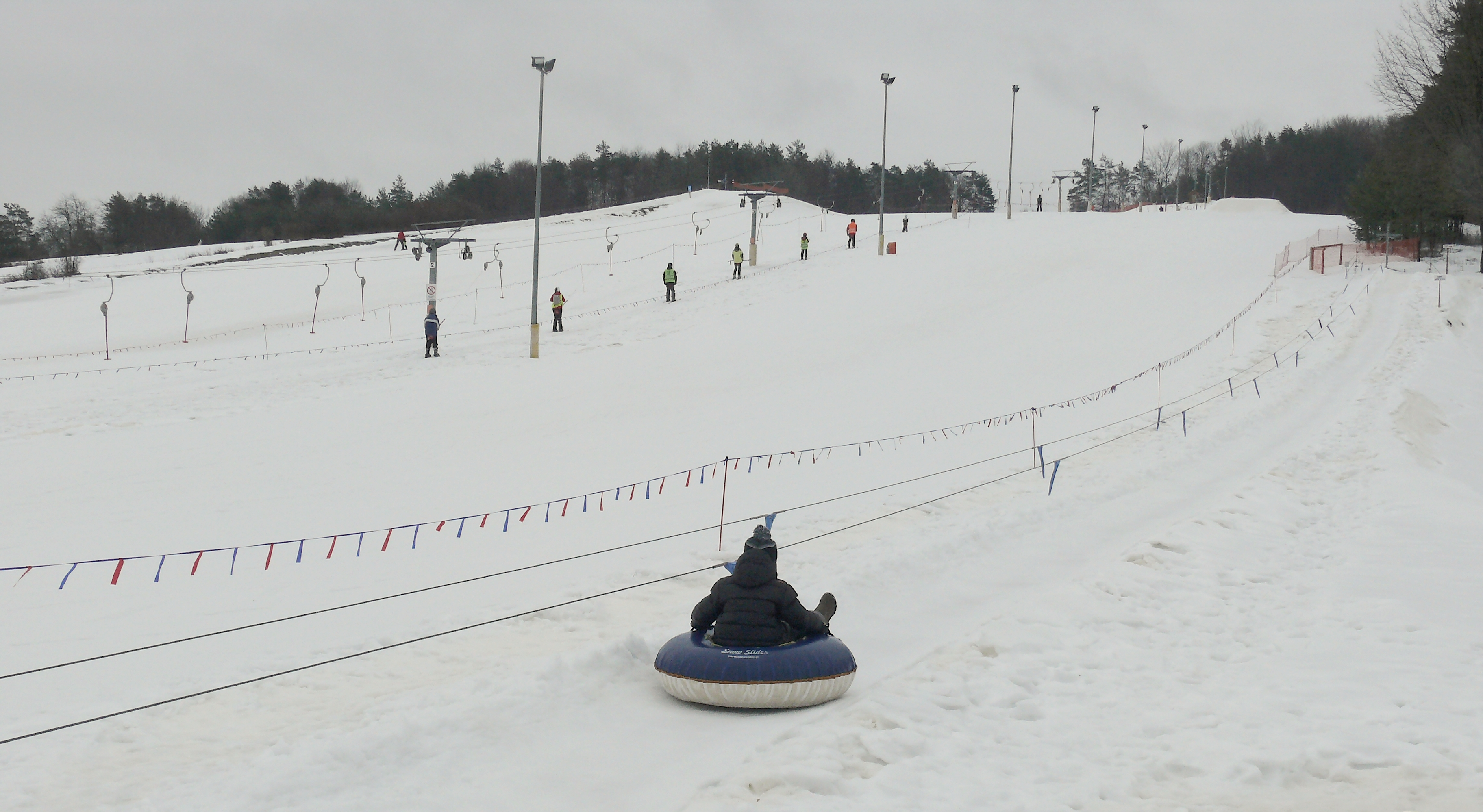 Tereny zimowej rekreacji w Jacni, gm. Adamów, woj. lubelskie